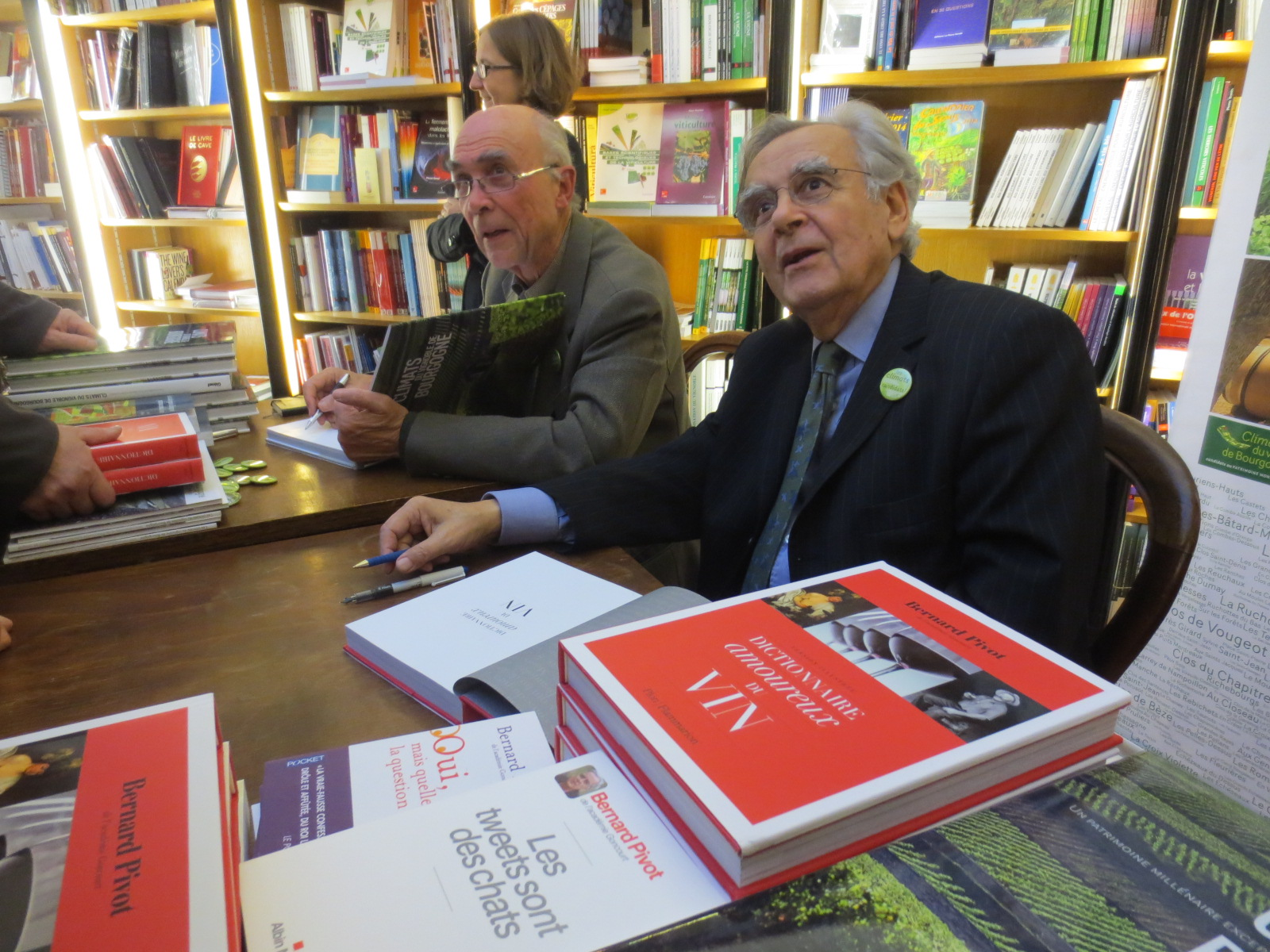 Vente des hospices de Beaune, Aubert de Villaine (viticulteur propriétaire des Romanée Conti) et de Bernard Pivot